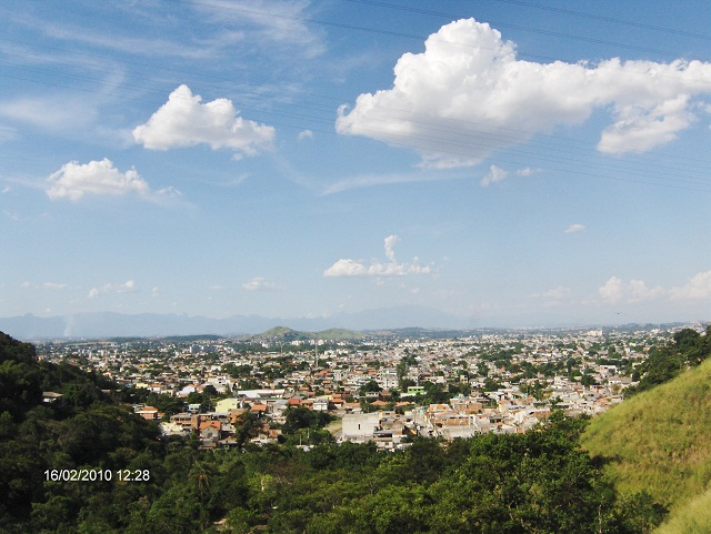 Panorâmica do Bairro Realengo a partir do Parque Estadual da Pedra Branca em Rio de Janeiro no Brasil.